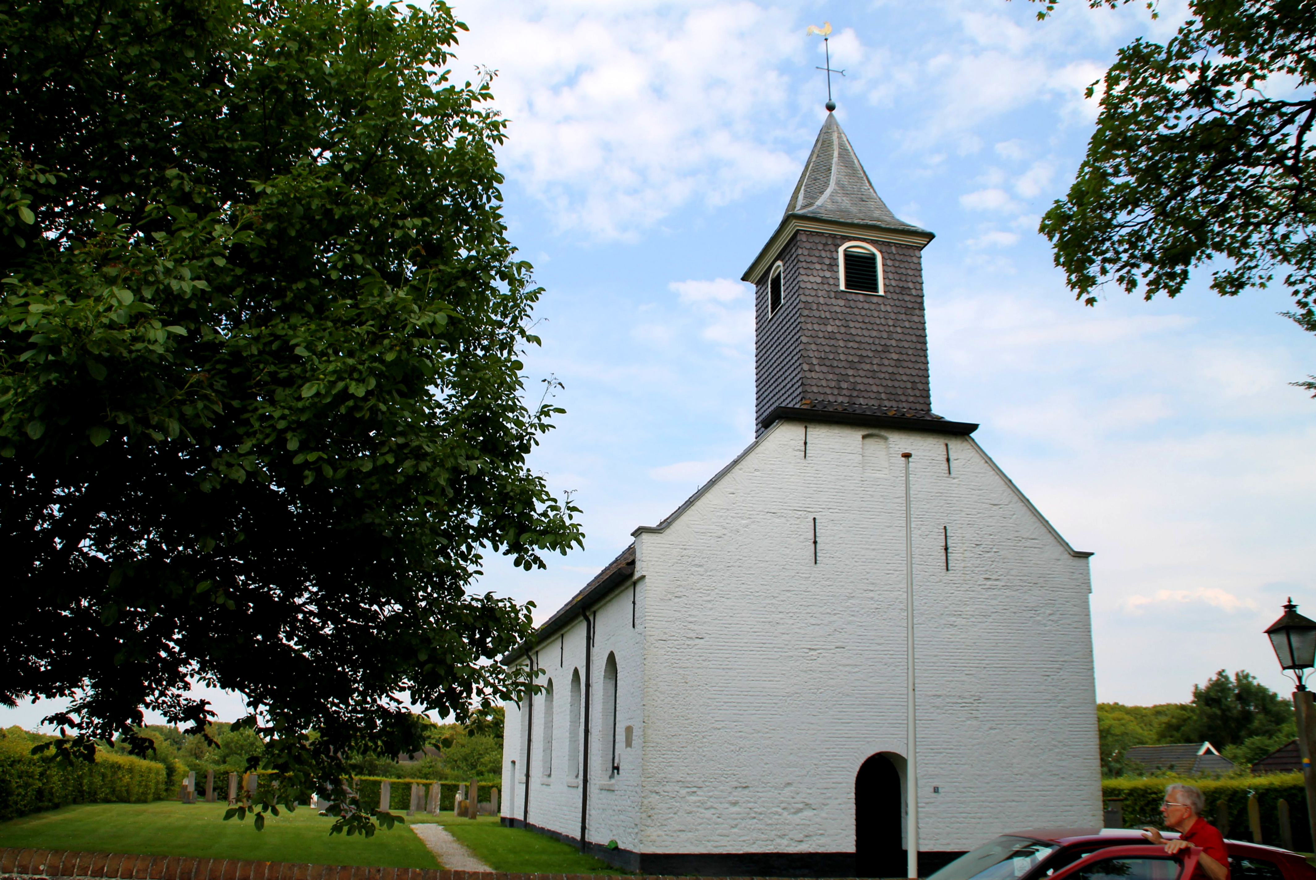 Witte Kerkje van Gasselte.